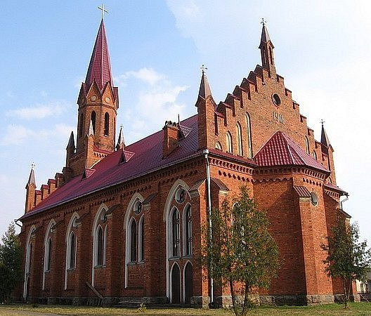 д. Столовичи, костел Сердца Иисуса (1907—11 гг.) Фото путешествия по Беларуси.